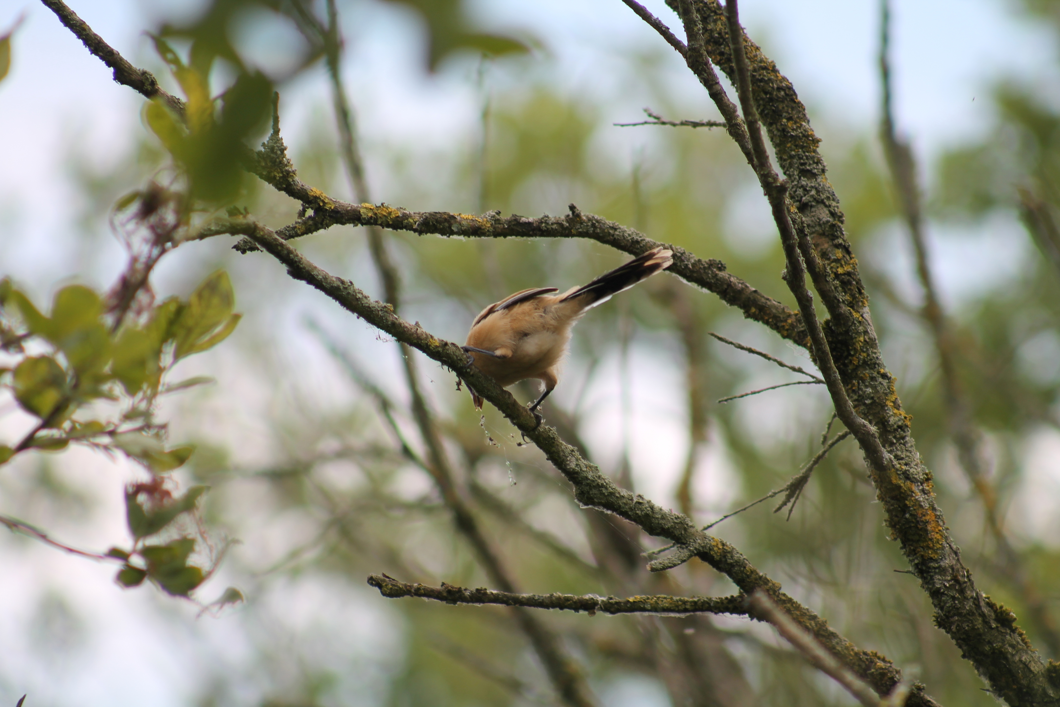 baardmannetje